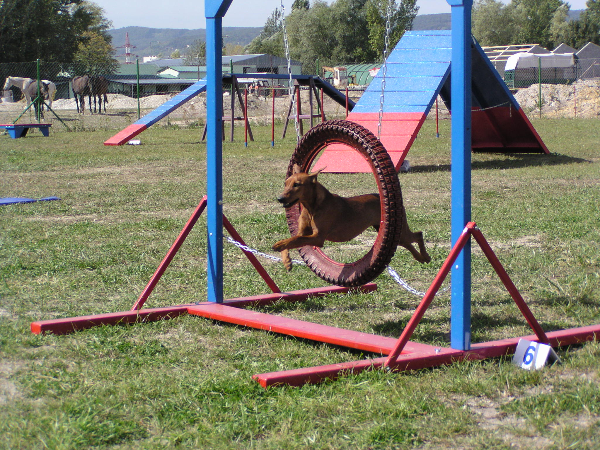 Circle photo by Martina Vakoničová (